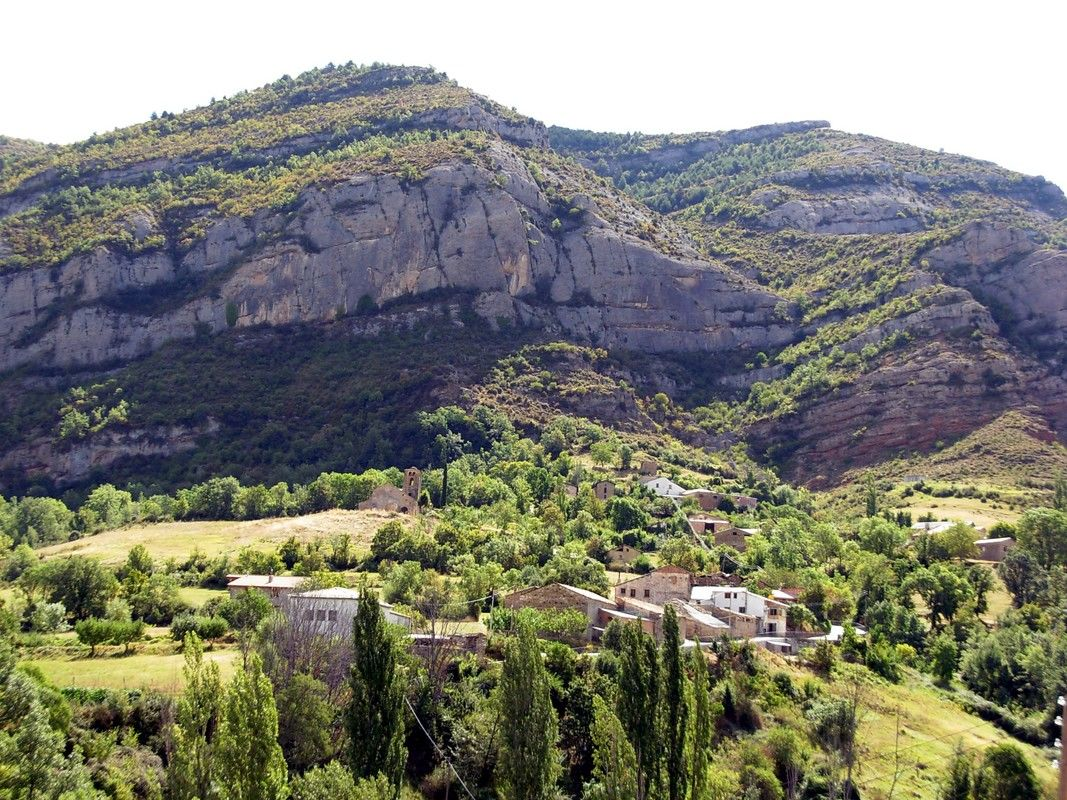 Beranui (Baixa Ribagorça)